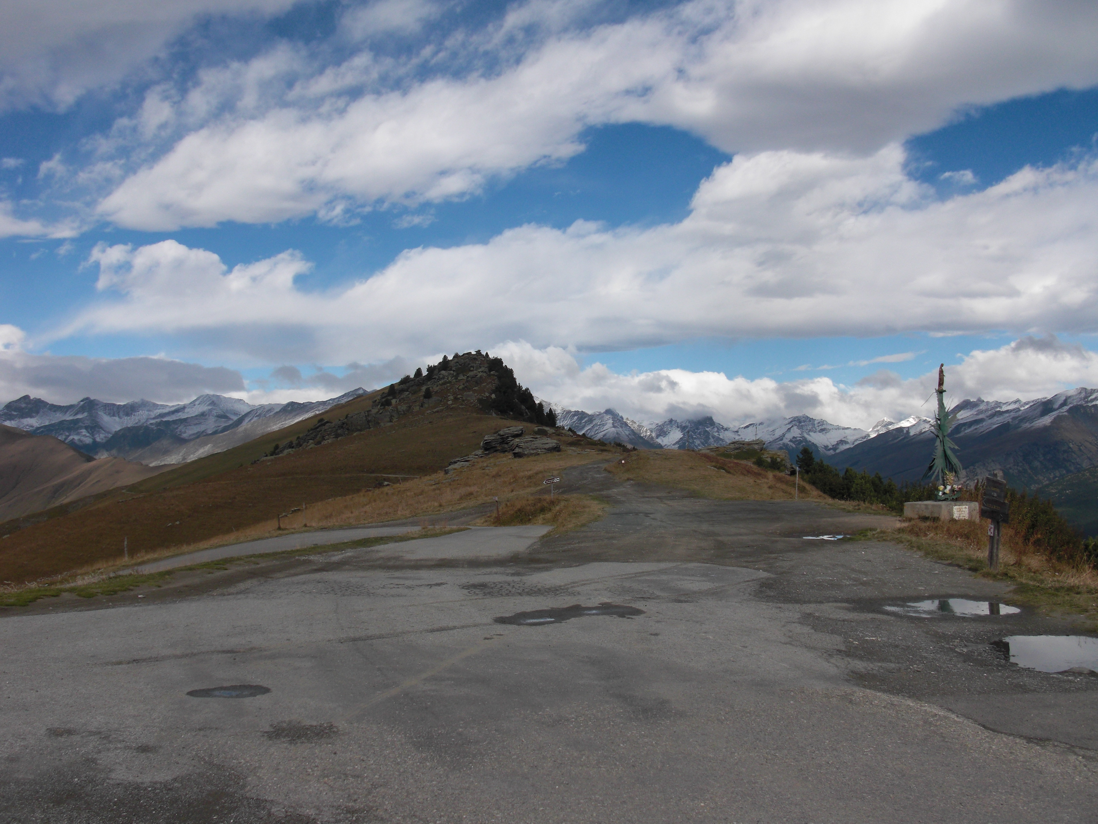 Colle di Sampeyre: Passhöhe, Blick Richtung Westen (Colle della Bicoccia)